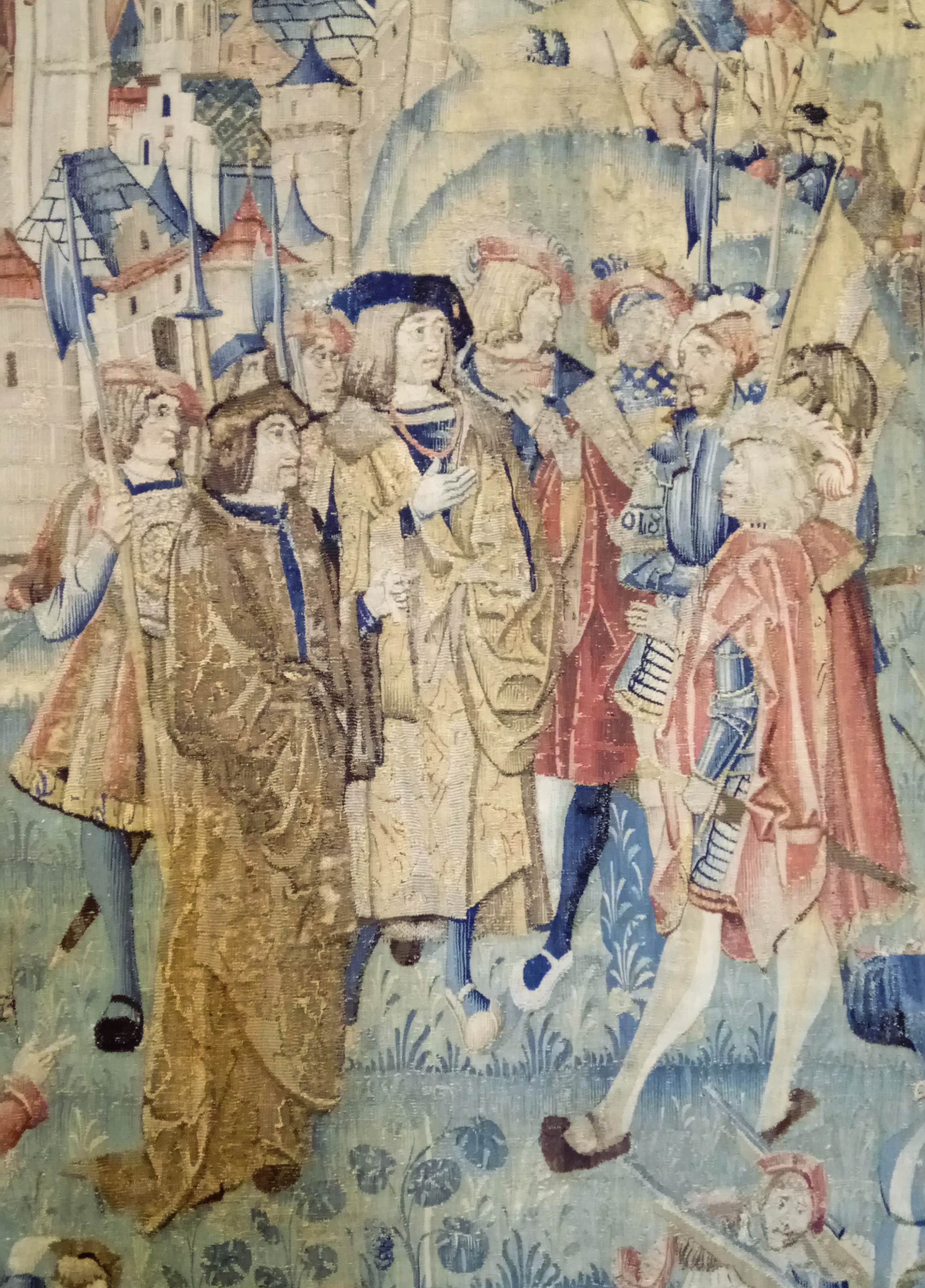 Représentation de Louis de La Trémoille (au centre) négociant le départ des Suisses en 1513, détail d'une tapisserie conservée au musée des beaux-arts de Dijon commémorant la levée du siège de Dijon.